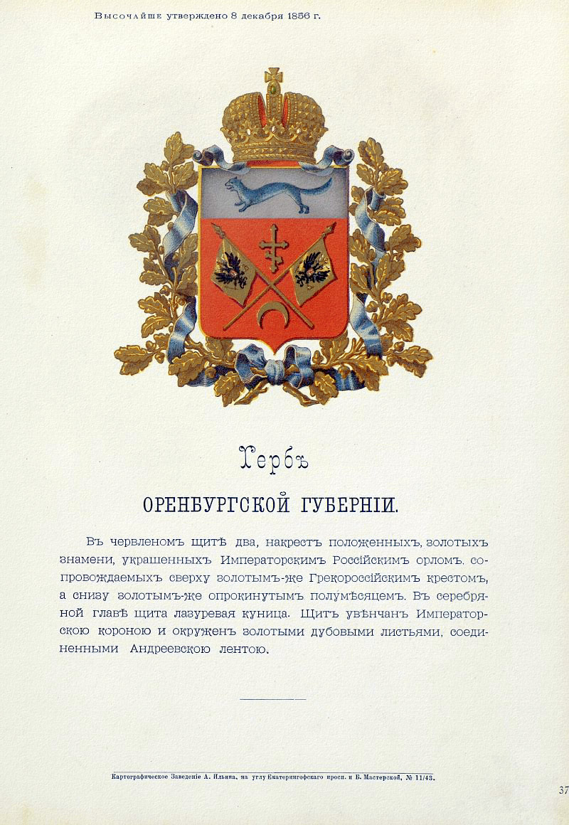 Official Russian Empire coat of arms Orenburg Governorate. Герб Российской Империи Оренбургской губернии с официальным описанием в Гербовнике Бенке. Утверждён Императором Всероссийским Александром Вторым в 1878 году.